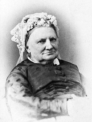 Ulrika von Strussenfelt (1801-1873)